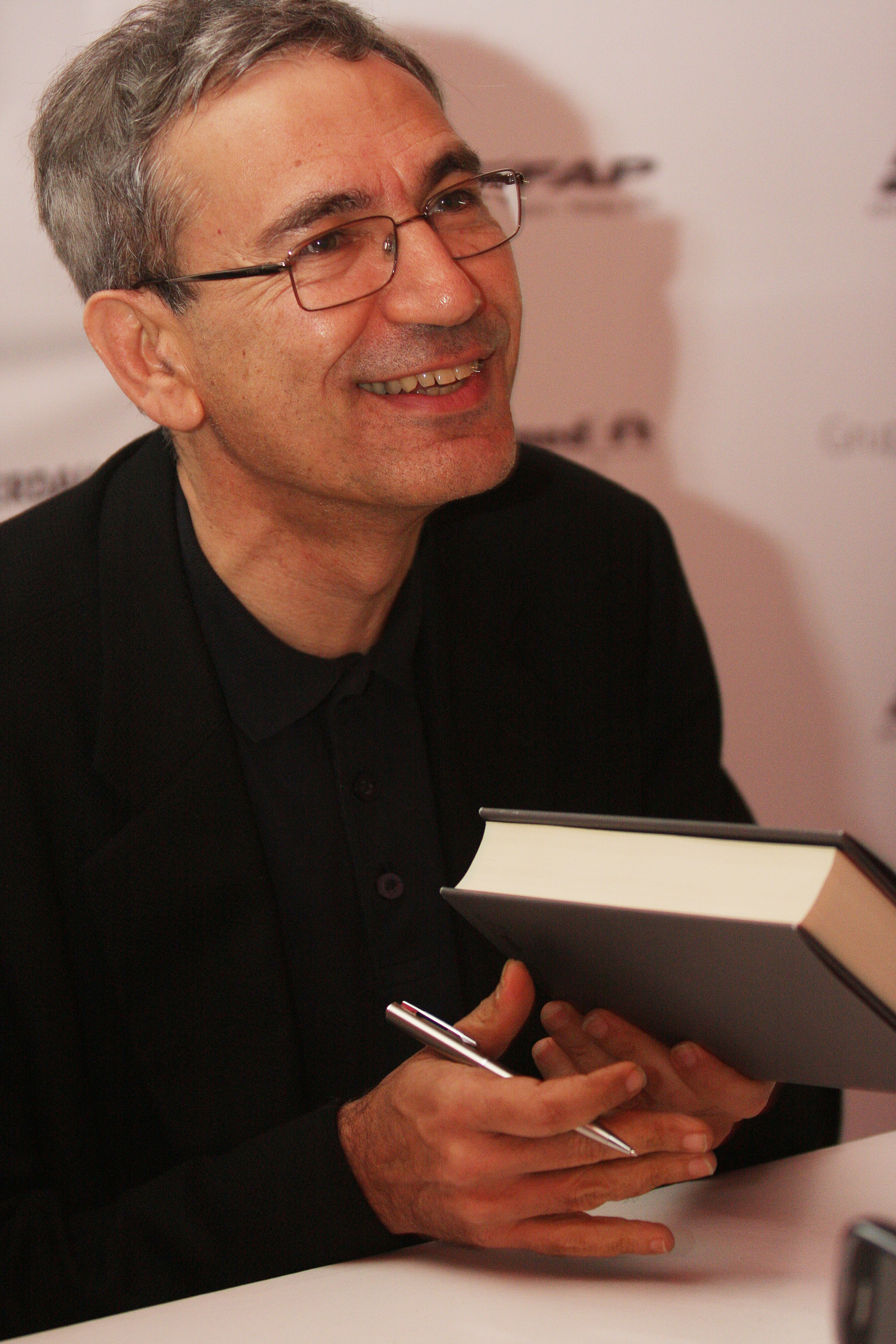 Orhan Pamuk - sessão de autógrafos após a conferência